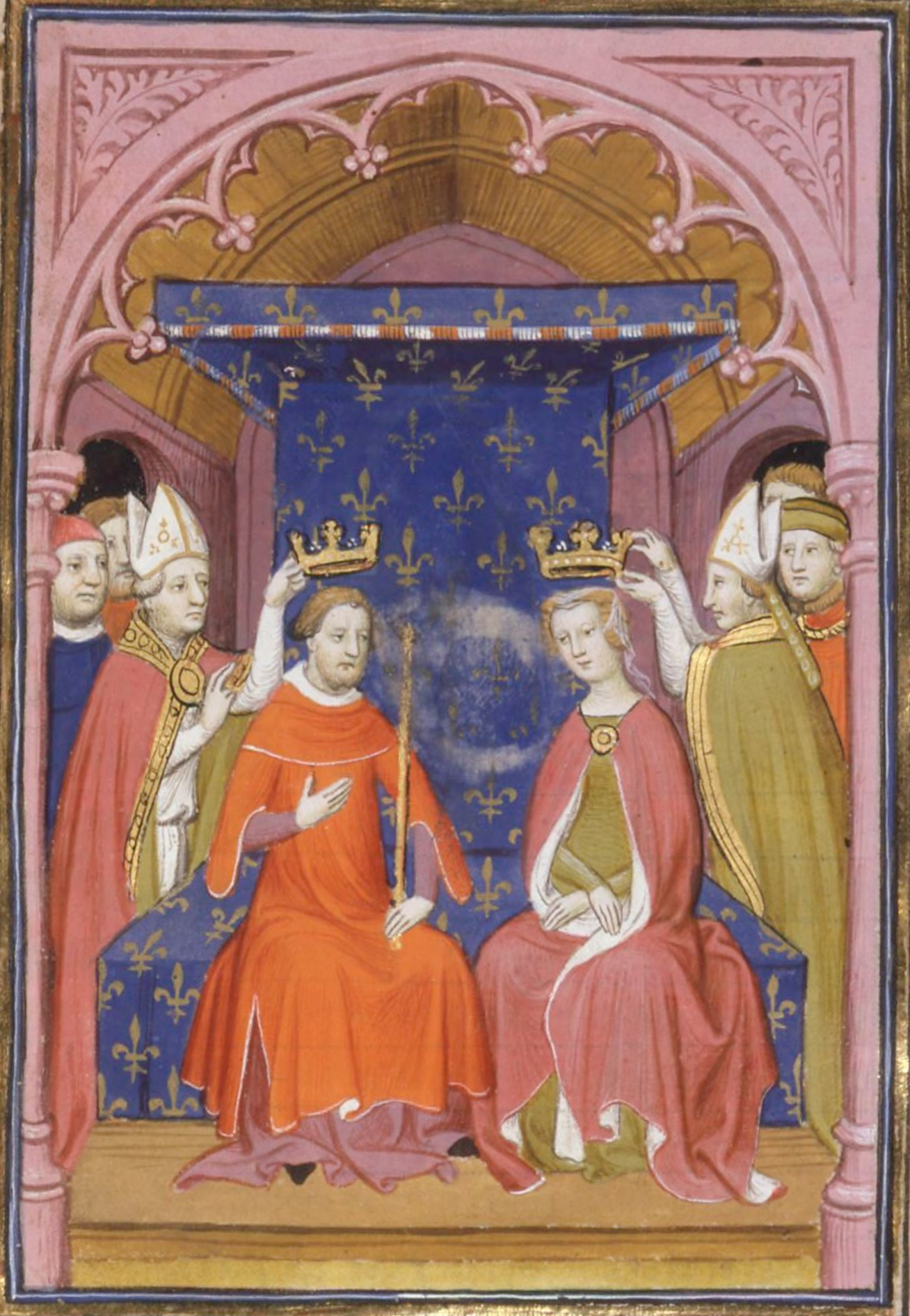 Couronnement de Jean II le Bon